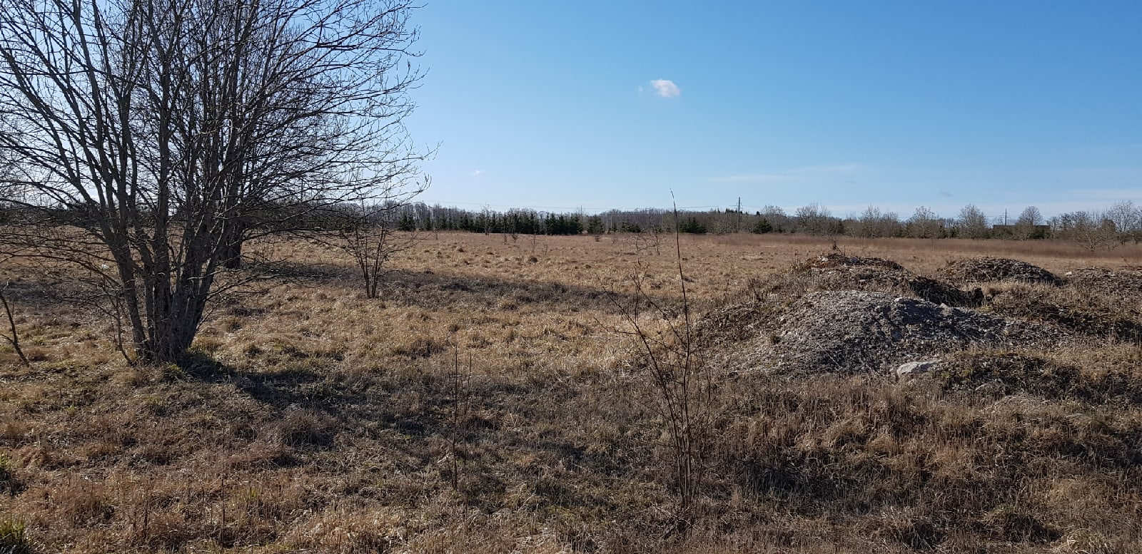 Vaade Ööbiku teelt metsale ning põllule